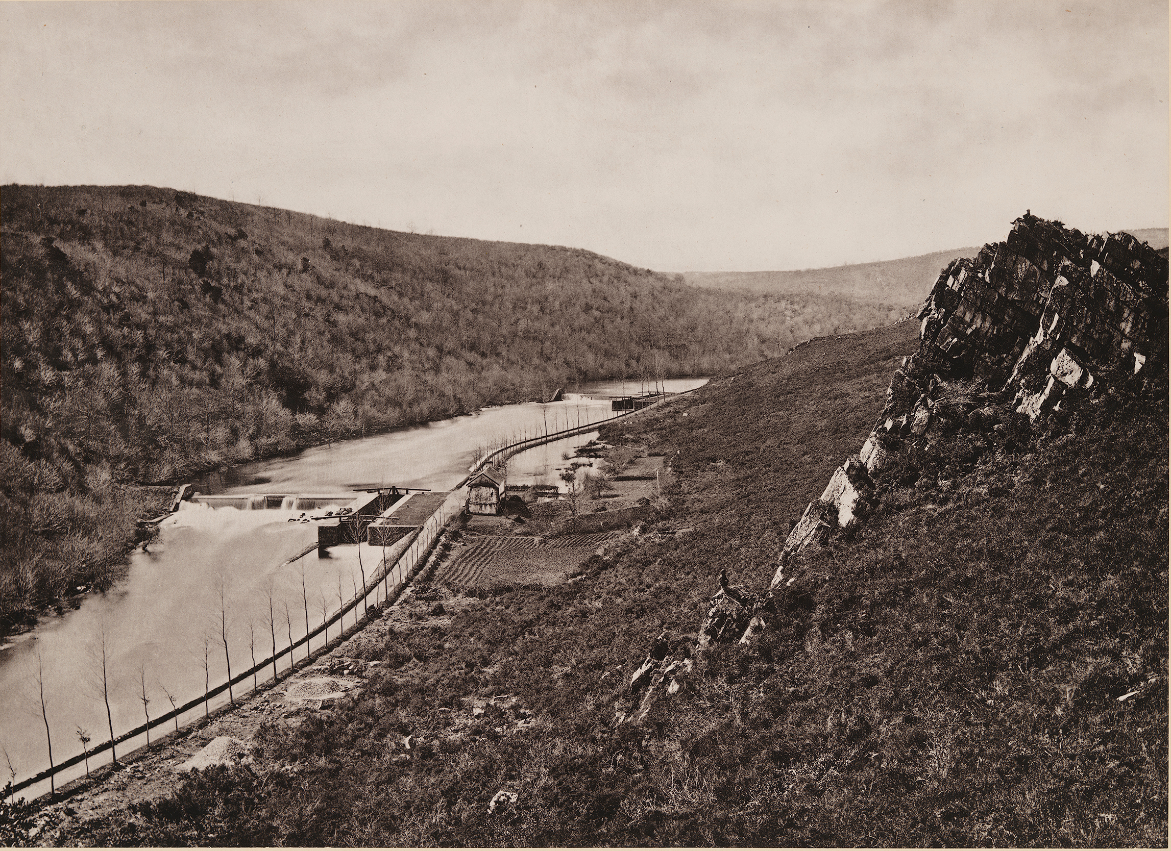 Titre : Écluses de la Vallee du Malvran Autre titre : La vallée d'écluses de Malvran Créateur : Jules Duclos Extrait de : Les Travaux Publics de la France, Troisième Tome : "Rivières et Canaux, Eaux des Villes - Irrigation et Assainissement des Terres" Lieux : Sainte-Brigitte, Morbihan, Bretagne, France Description technique : Une photographie imprimée de dimension ; 26 x 35 cm Fichier : vault_folio_2_ta71_a4_1883_3_32_opt.jpg Droits : Veuillez citer "la Southern Methodist University", "la Central University Libraries" et "la DeGolyer Library" lorsque vous utilisez cette image. Une version de haute qualité de ce fichier peut être obtenue moyennant un supplément en contactant " ". Pour plus d'informations, voir